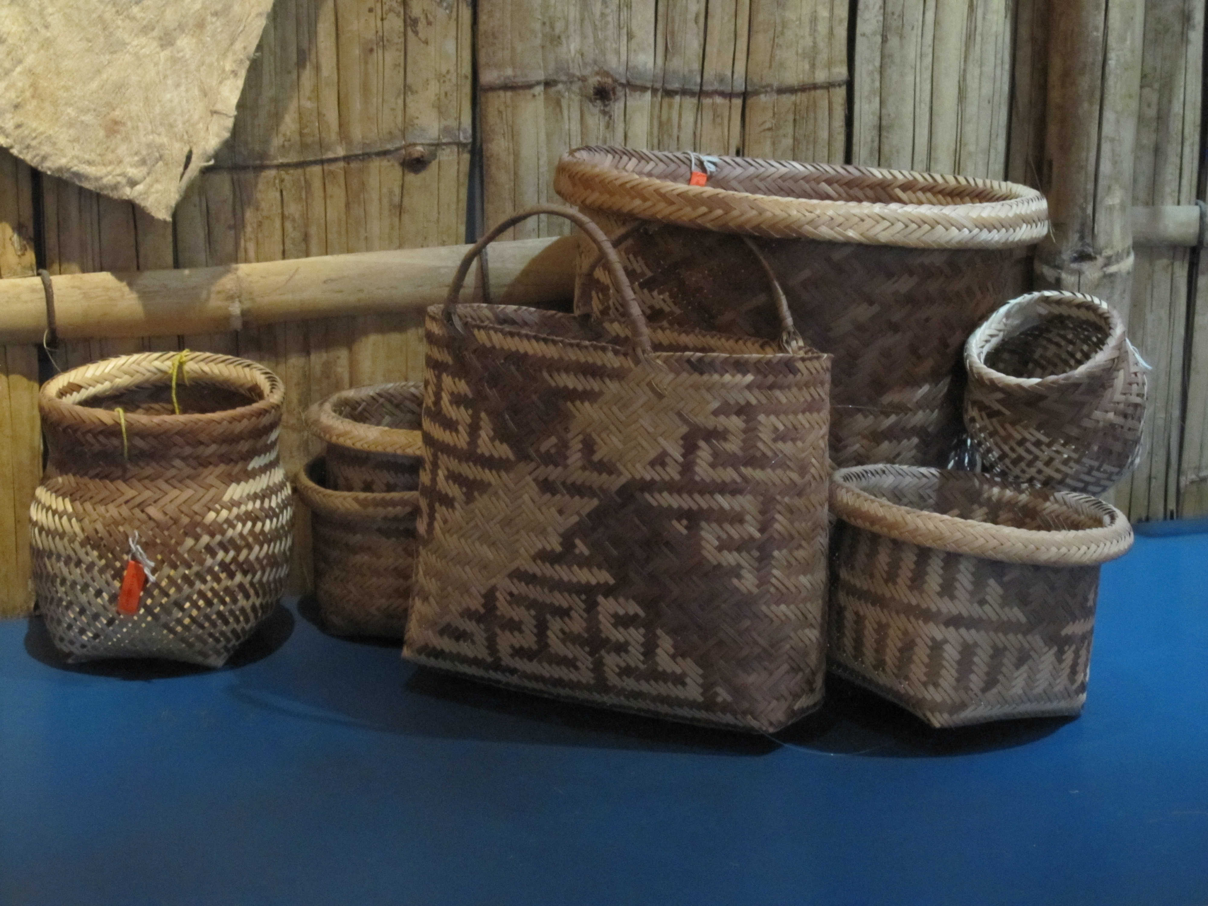 Chachi-Cayapa baskets